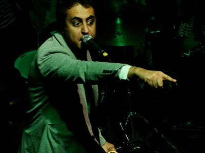 Leo Quinteros en vivo